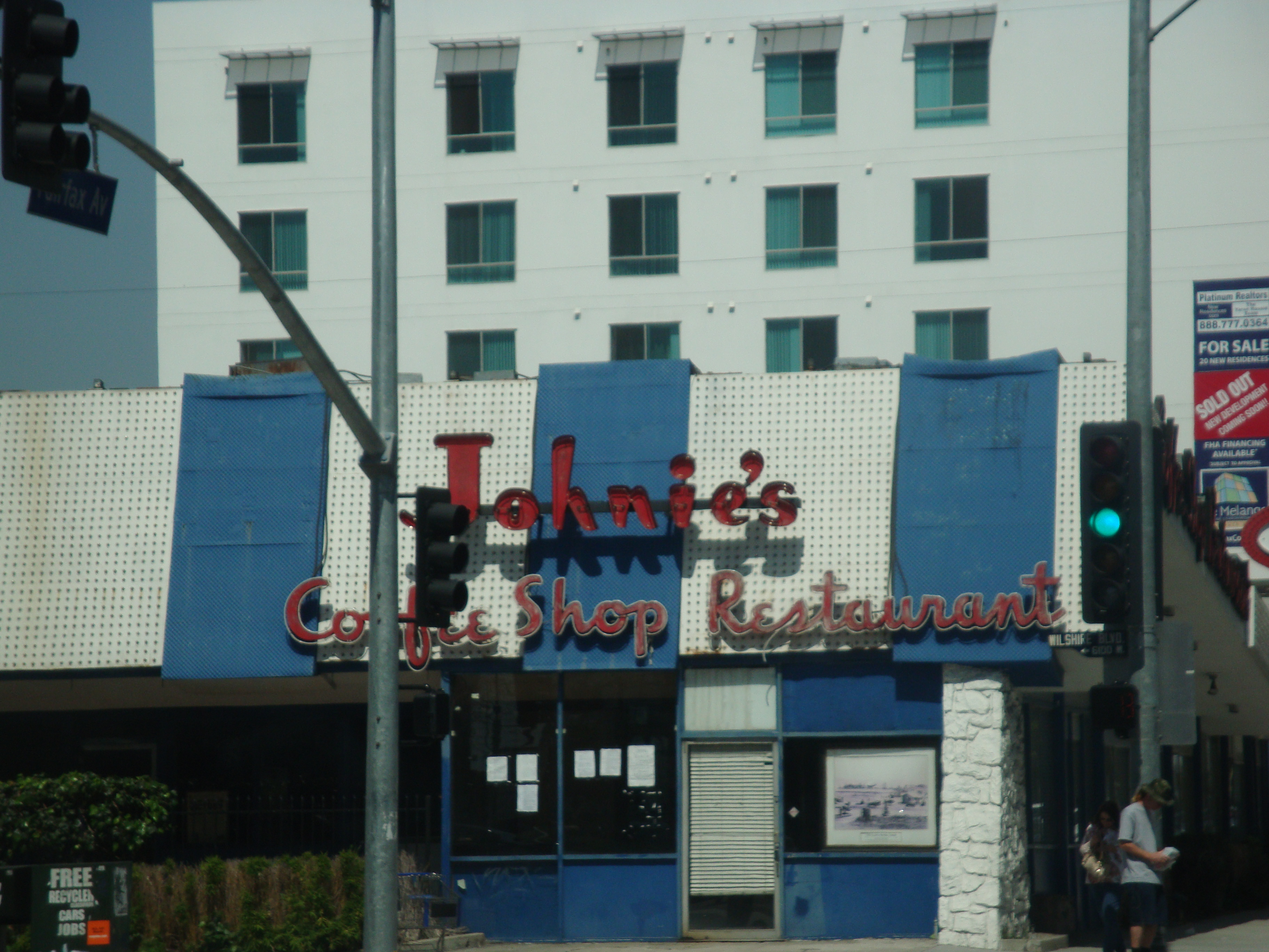 Los Angeles, Big Lebowski Cafe